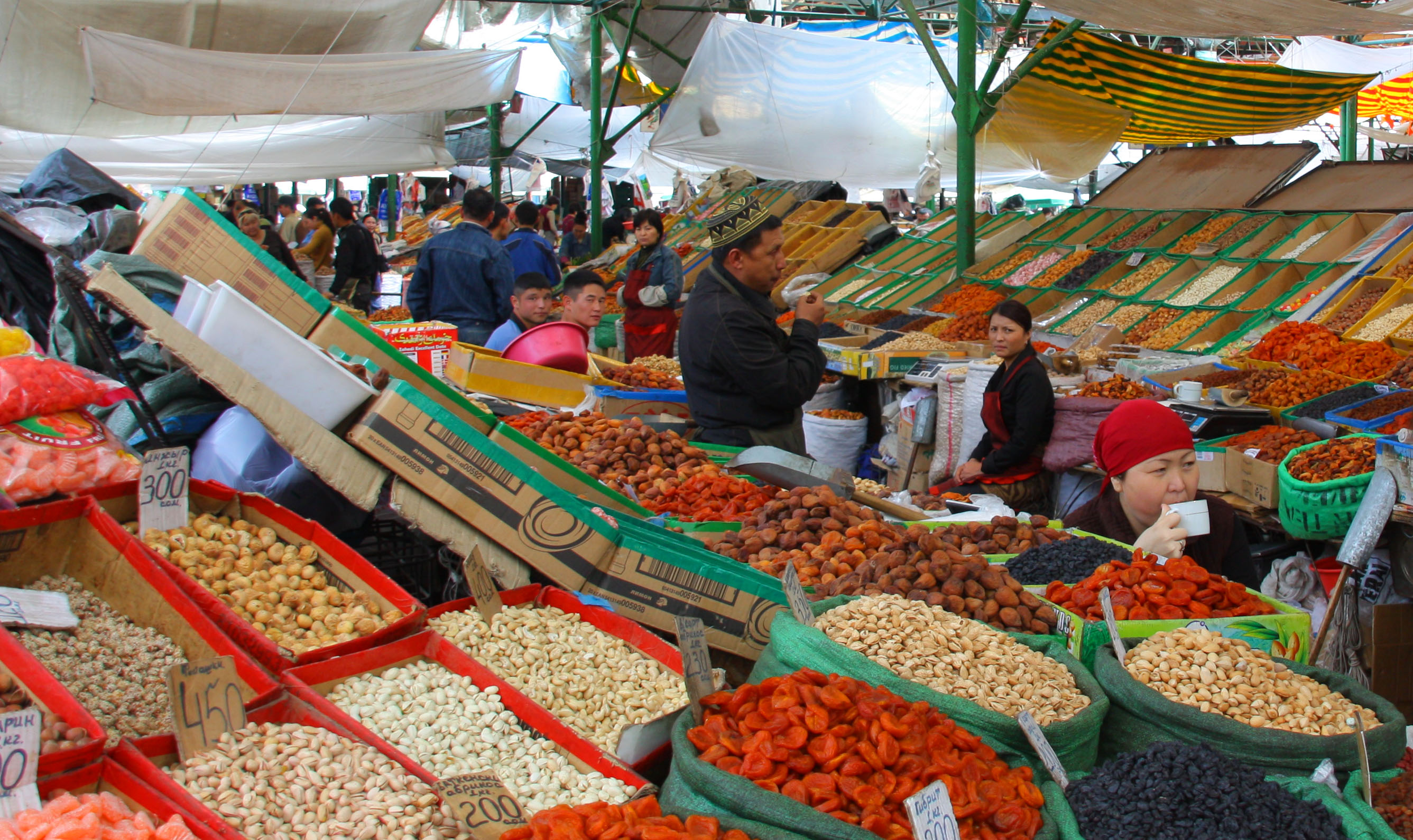 Osh Bazaar in Bishkek, Kyrgyzstan